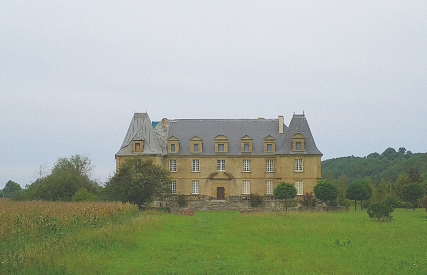 le château de Betplan .